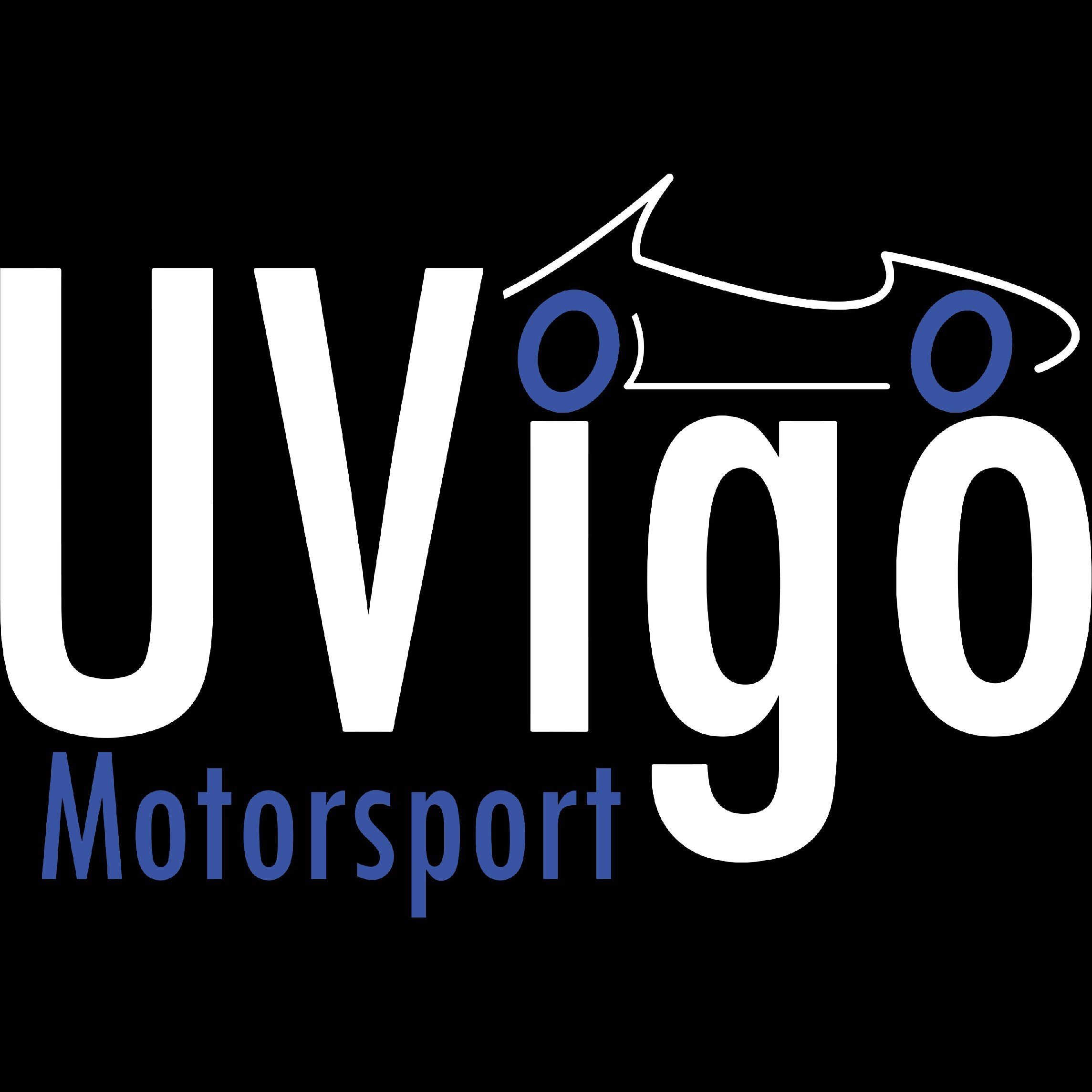 Logo de UVigo Motorsport